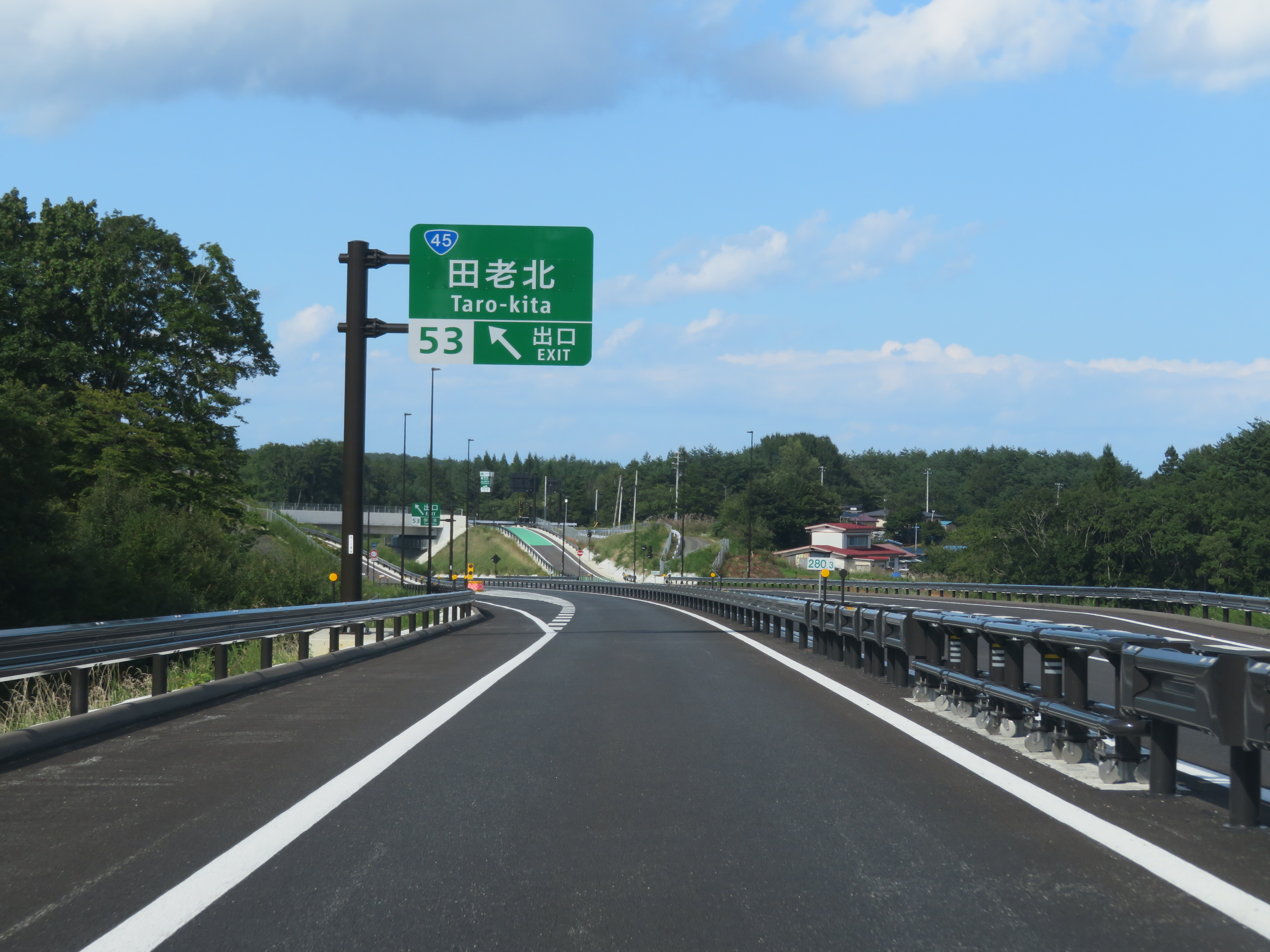 三陸自動車道田老北インターチェンジ（田老真崎海岸ＩＣ方面から撮影） Canon PowerShot SX720 HS